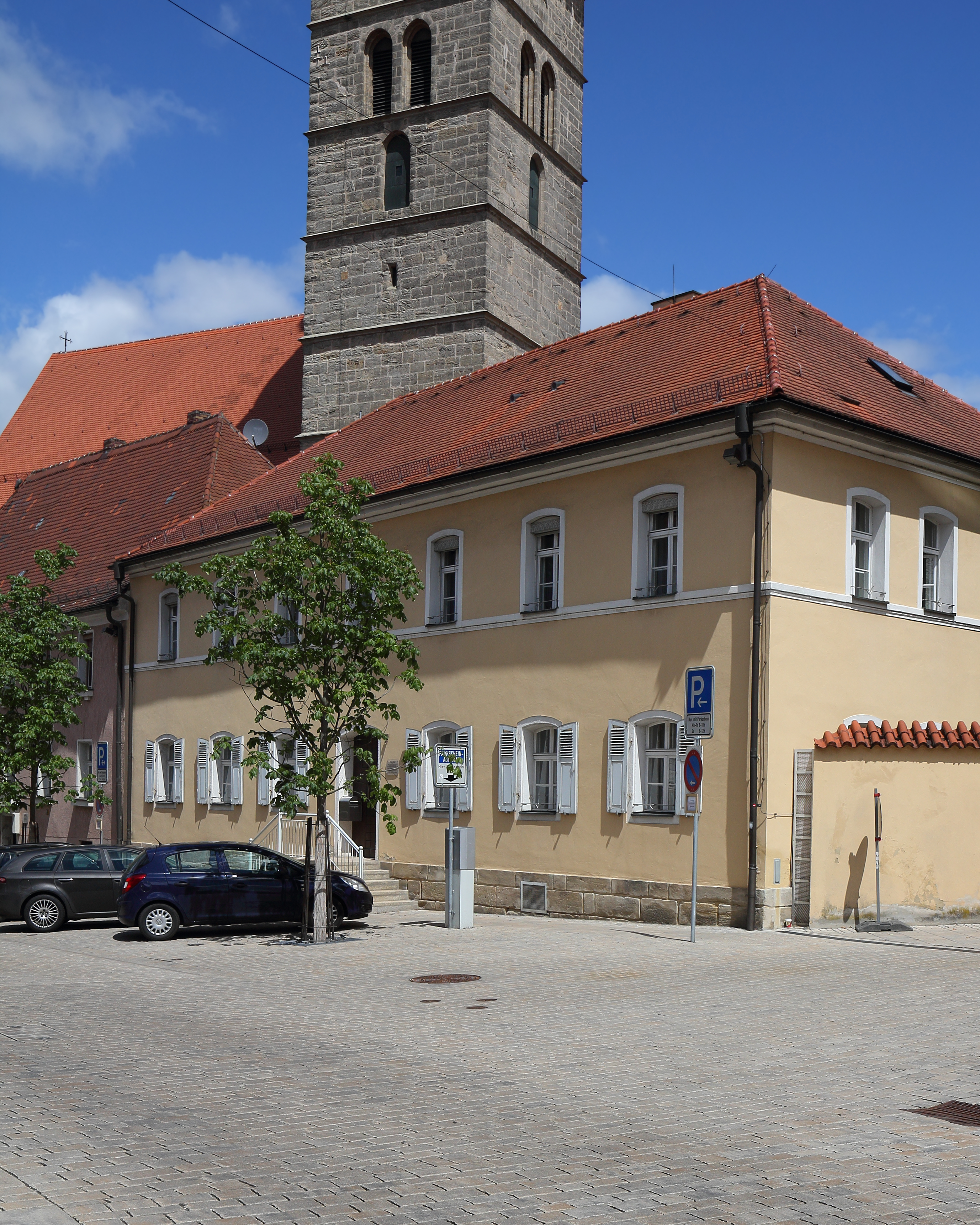 Auerbach in der Oberpfalz - Pfarrstraße 7 - Putzbau. Langgestreckter Putzbau mit Walmdach, 2. Hälfte 19. Jahrhundert; über dem Portal Holzplastik hl. Sebastian; siehe auch Ensemble Marktplatz und Kirchenbereich Auerbach.